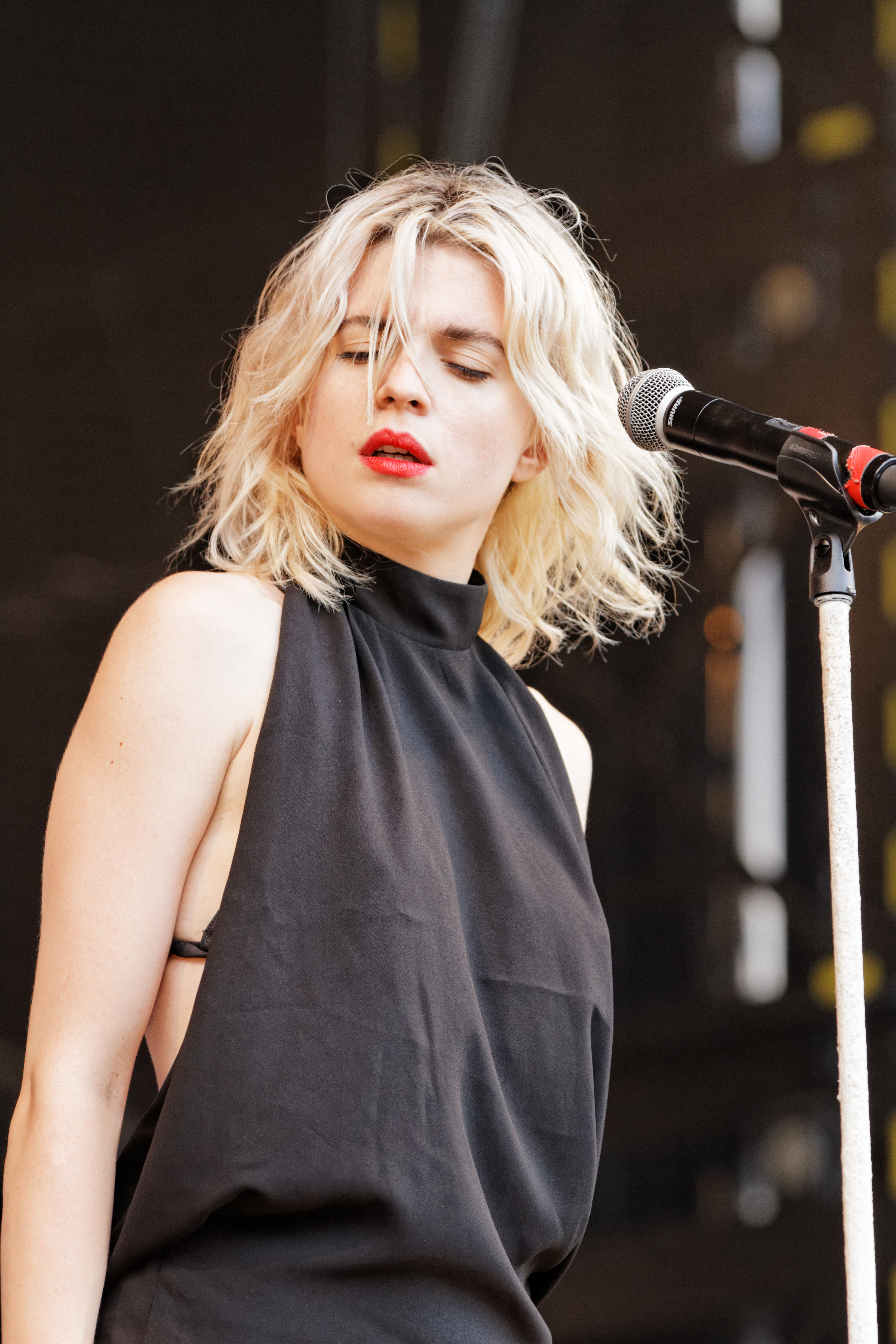 HollySiz en concert sur la scène Grall lors du festival des Vieilles Charrues 2014.